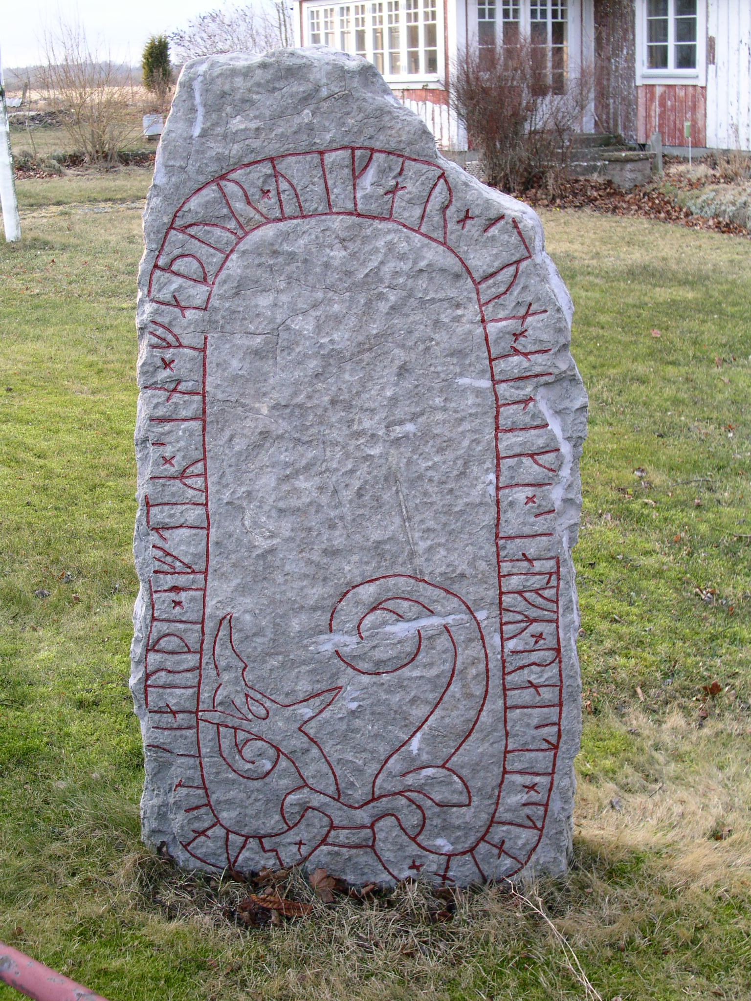 Den södra runstenen (Öl 39) i Övra Bägby, Gärdslösa socken, Öland